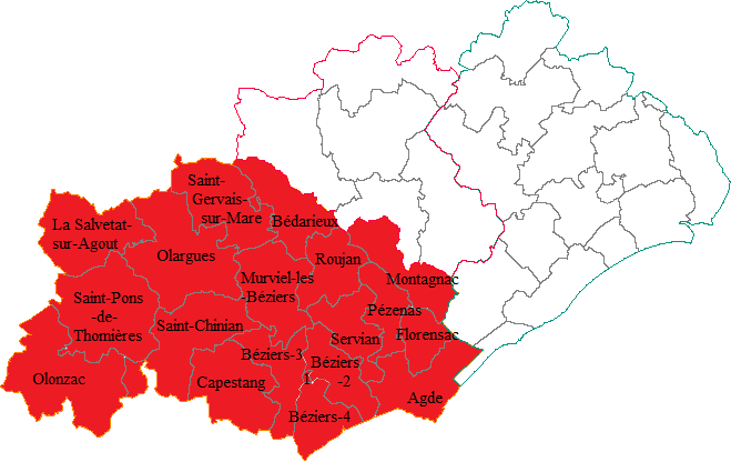 Carte des cantons composant l'arrondissement de Béziers (Hérault)